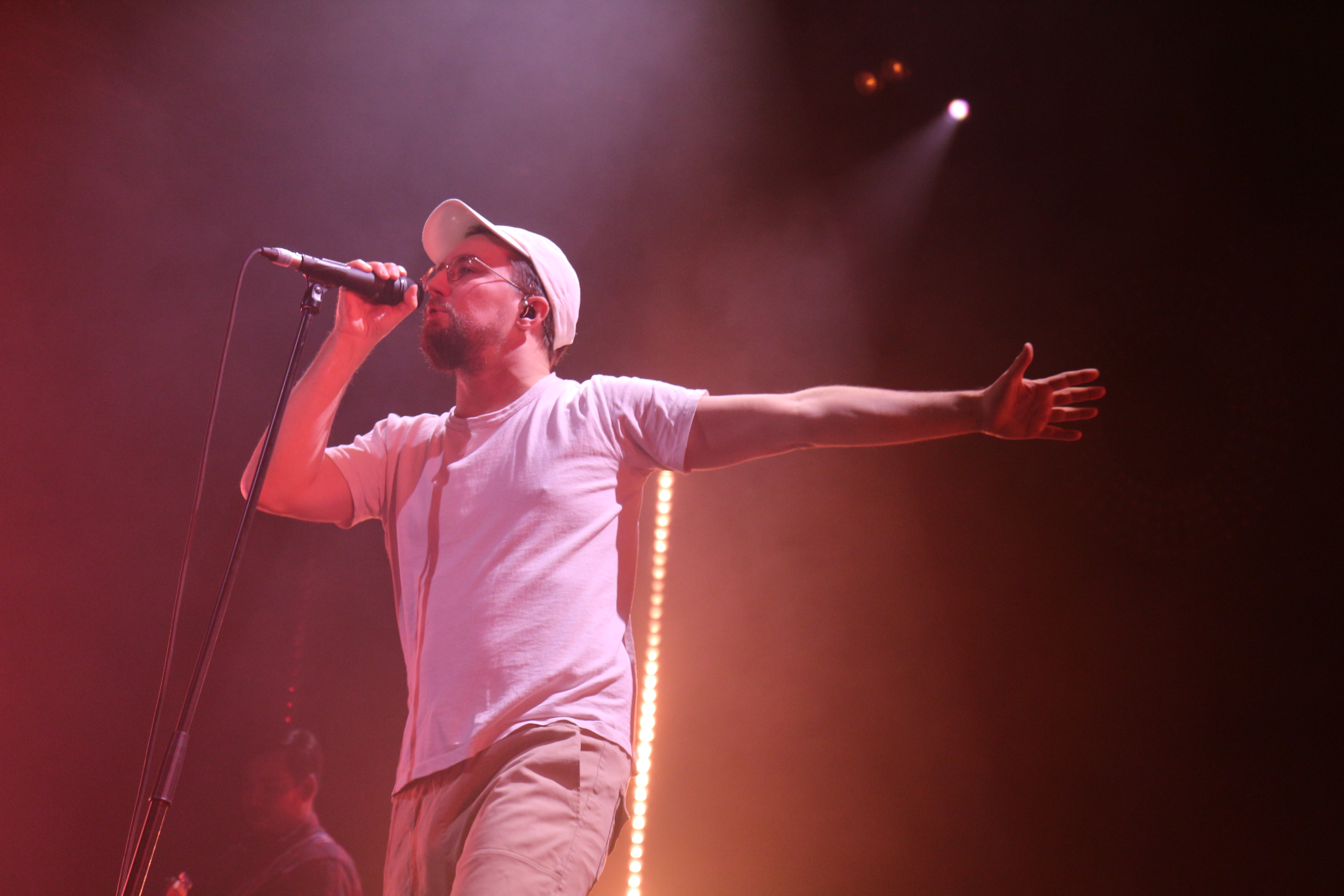 Prinz Pi - Muffathalle, München - 14.11.2019 Graben